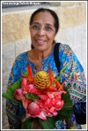 Fotografia de Jorge Trabulo Marques